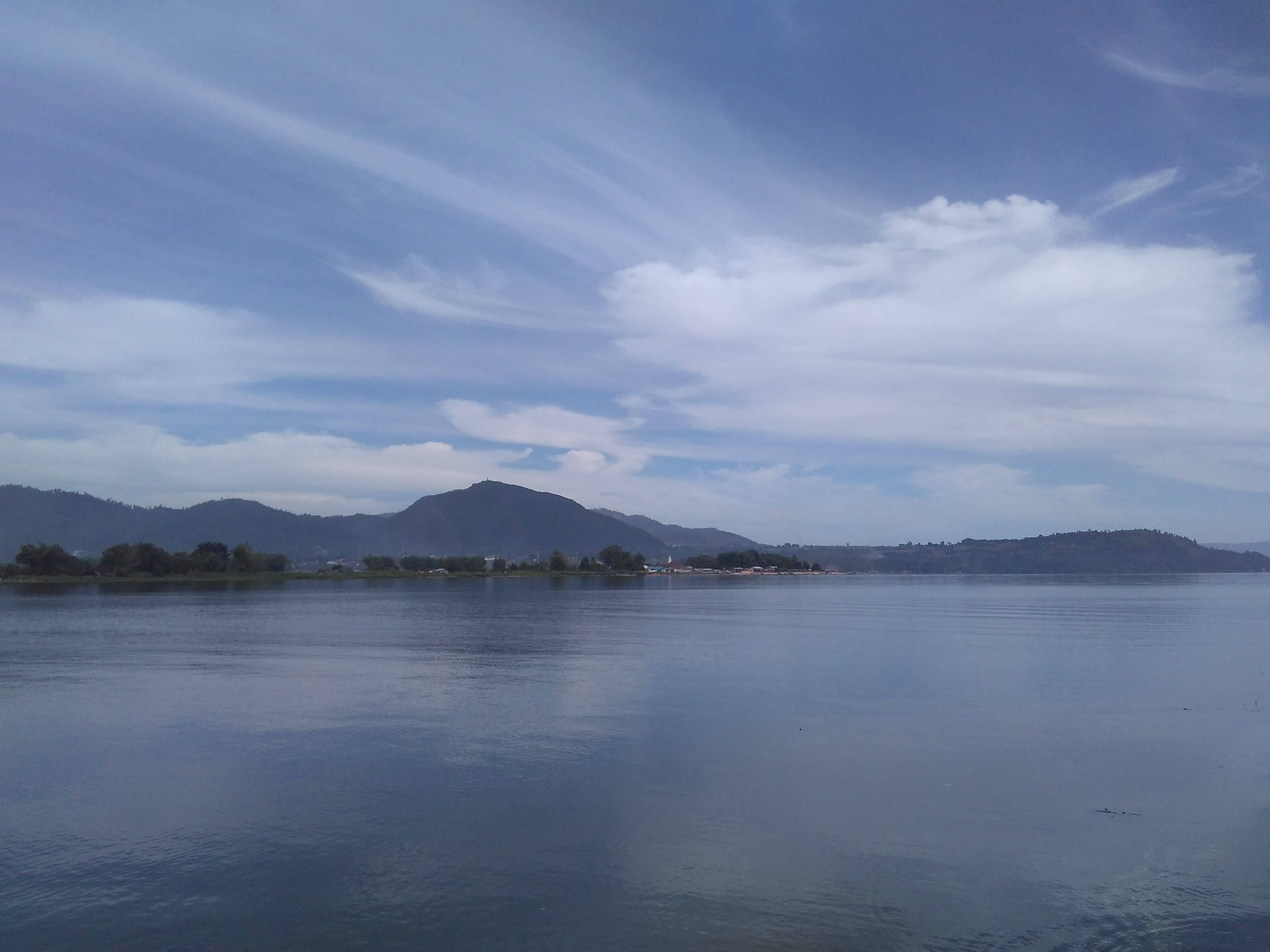 Foto danau toba dengan air jernih yang tenang didukung oleh langit yang biru dipagi hari di ambil dari desa Tambunan Lumban Gaol Kab. Toba Samosir